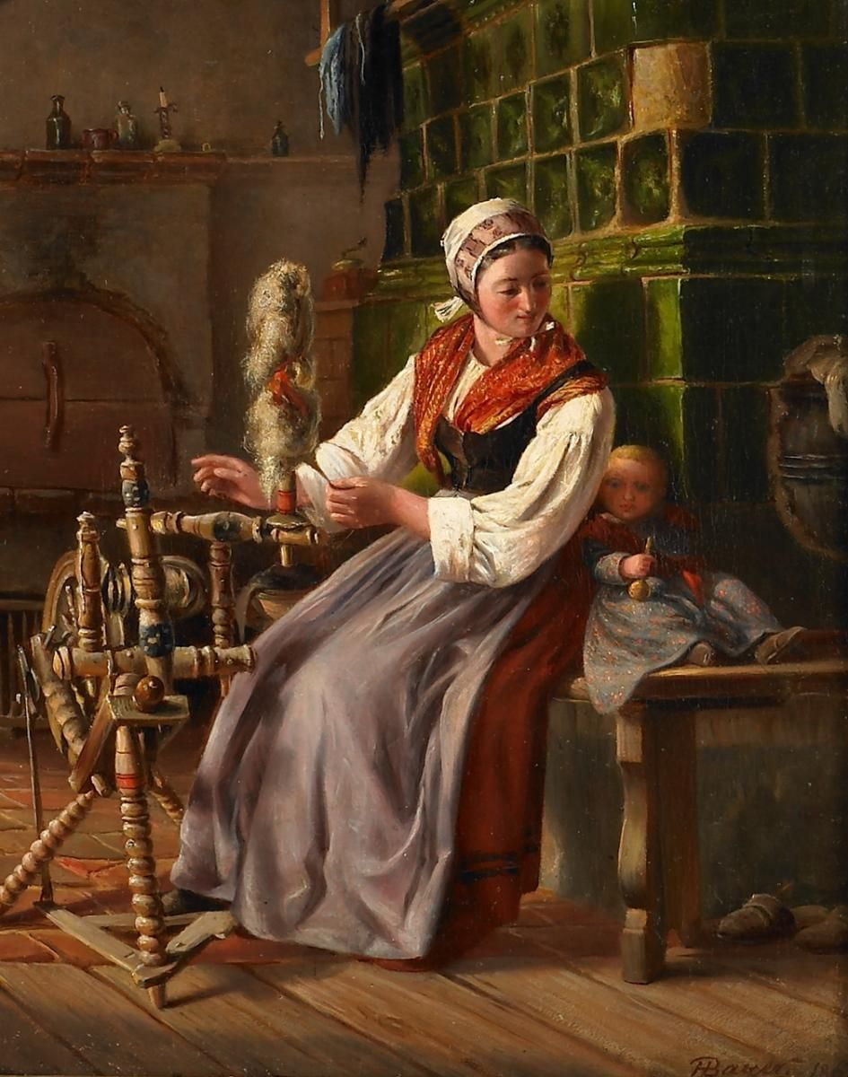 Mutter mit Kind am Spinnrad vor dem Kachelofen. Unten rechts: LIgatur HBayer 1863 (?). Öl auf Leinwand. 36 x 29,5cm